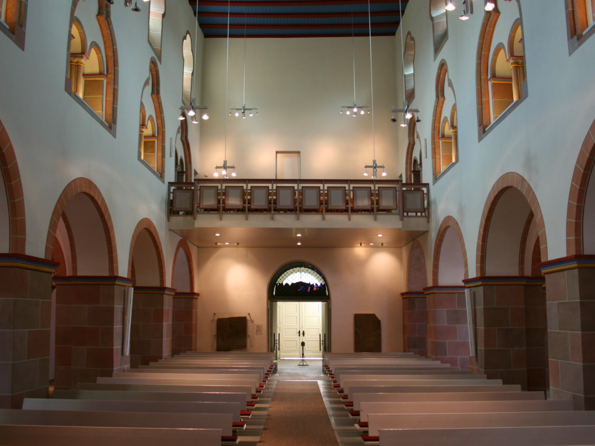 Jesus-Christus-Kirche in Meinerzhagen